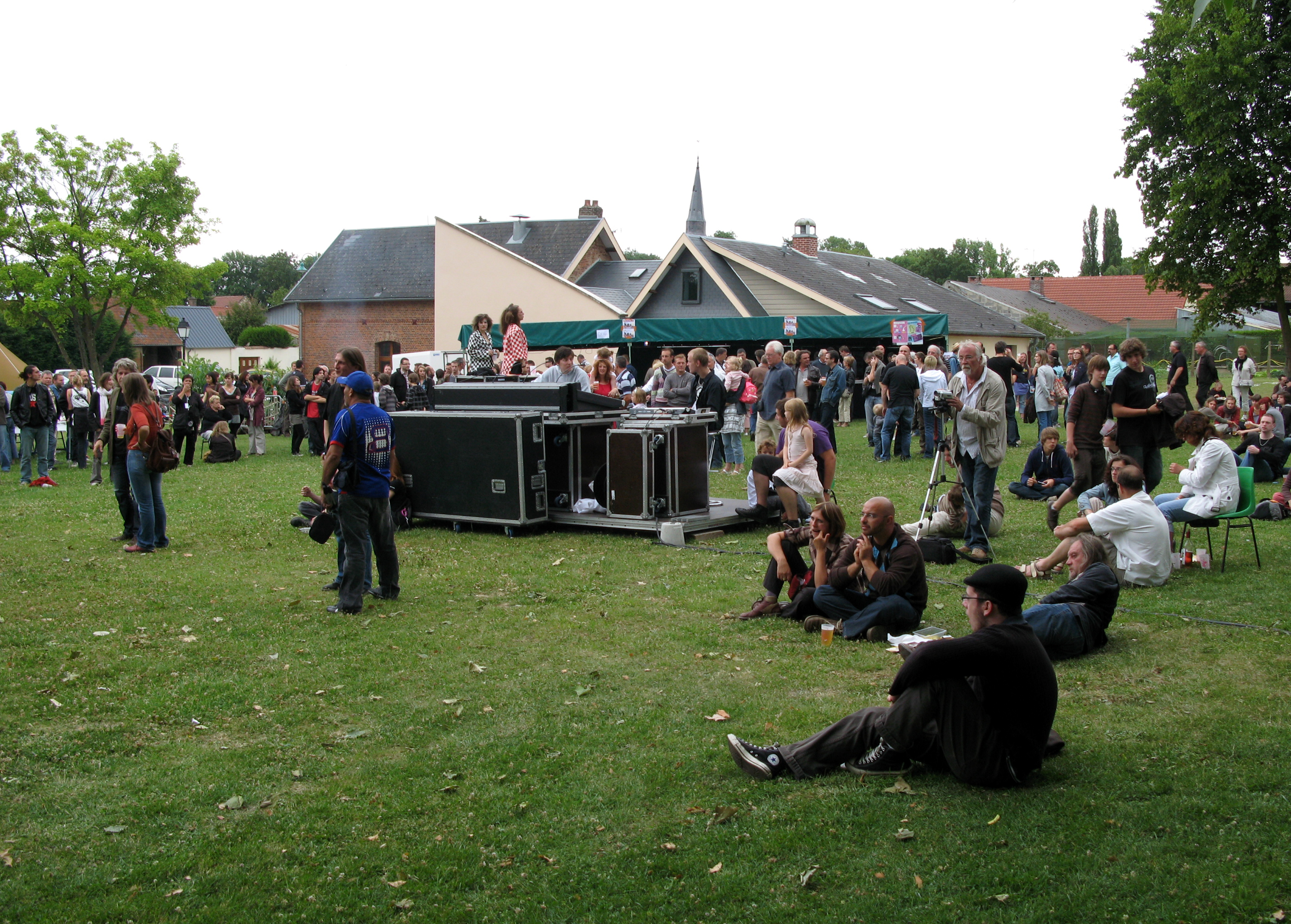 Revelles (Somme, France) - Série de concerts gratuits organisés par l'association R4 pour les « 11èmes Rencontres Rock'n Roll à Revelles ». Alors qu'une partie du public se presse à la buvette en attendant l'intallation du groupe "French Kiss", deux animatrices sur échasses parcourent le site. Depuis l'après-midi, à 15 heures, 4 groupes ont déjà assuré leur prestation. 4 autres groupes ont encore à se succéder sur scène.